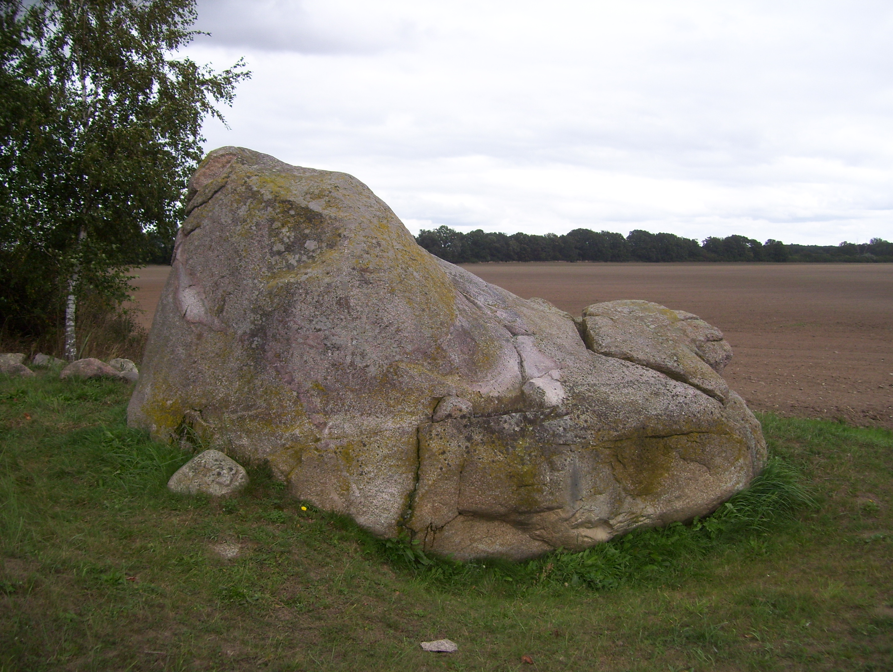 Friedland Mecklenburg Teufelsstein, Westseite.JPG